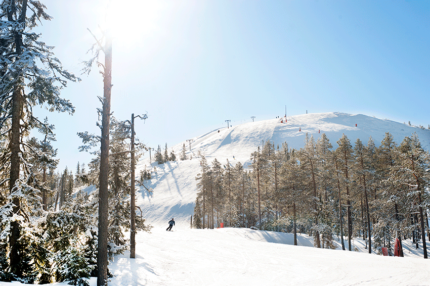 Solig vårvinter i Stöten